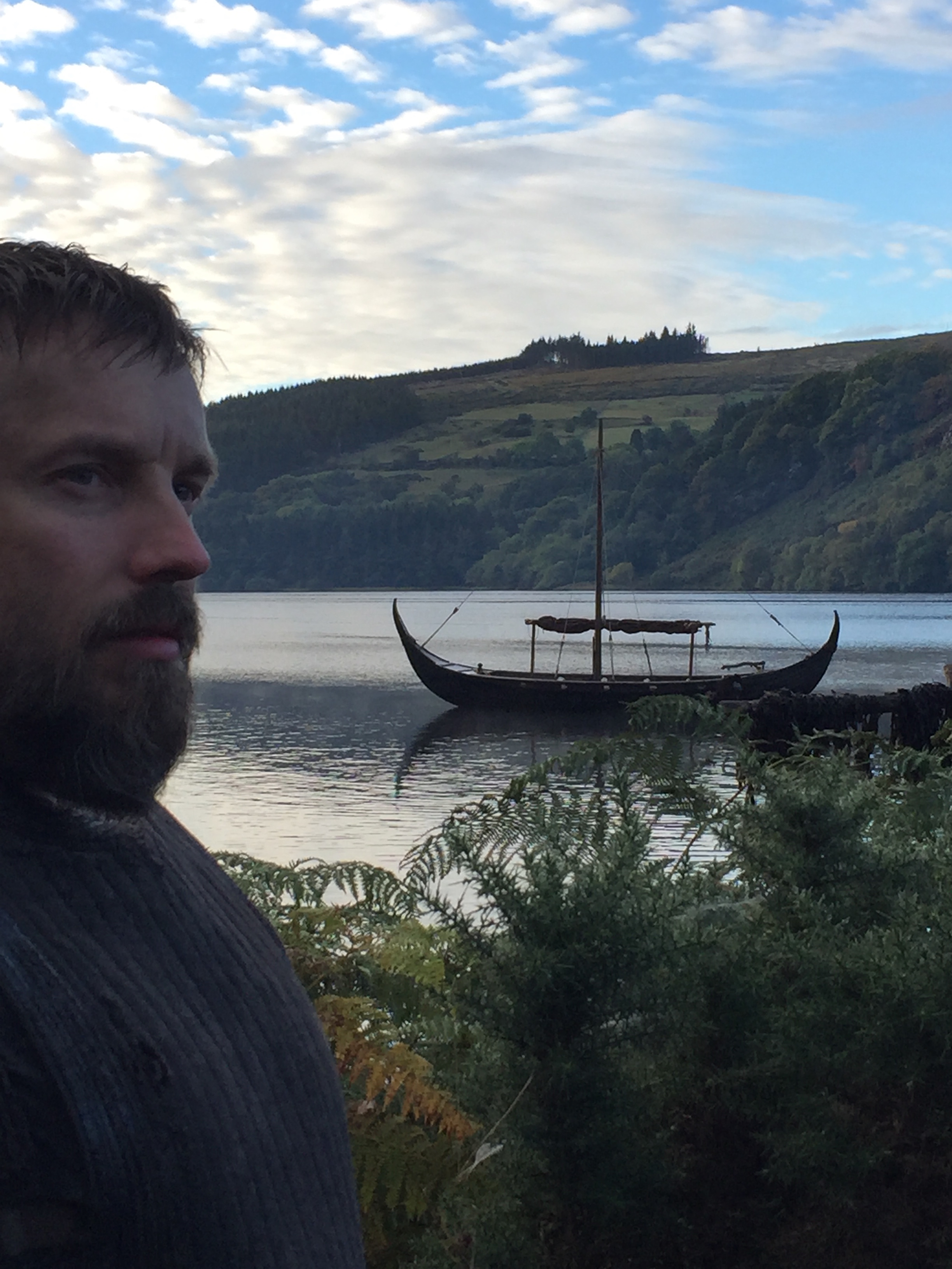 Johannes Lahtela "Vikings" -sarjan kuvauksissa Irlannissa 2015